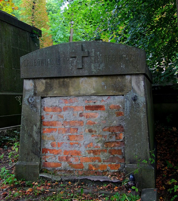 Гробівець родини Шендеровичів.Личаківський цвинтар , поле № 60.